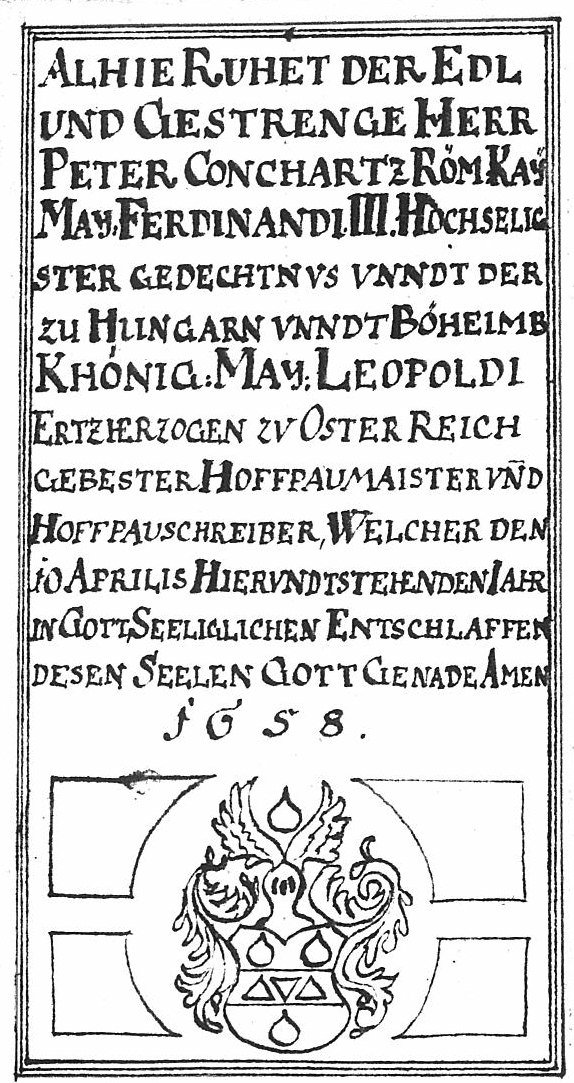 Peter Concorz, Zeichnung des nicht mehr erhaltenen Epitaphs in der Schottenkirche in Wien.